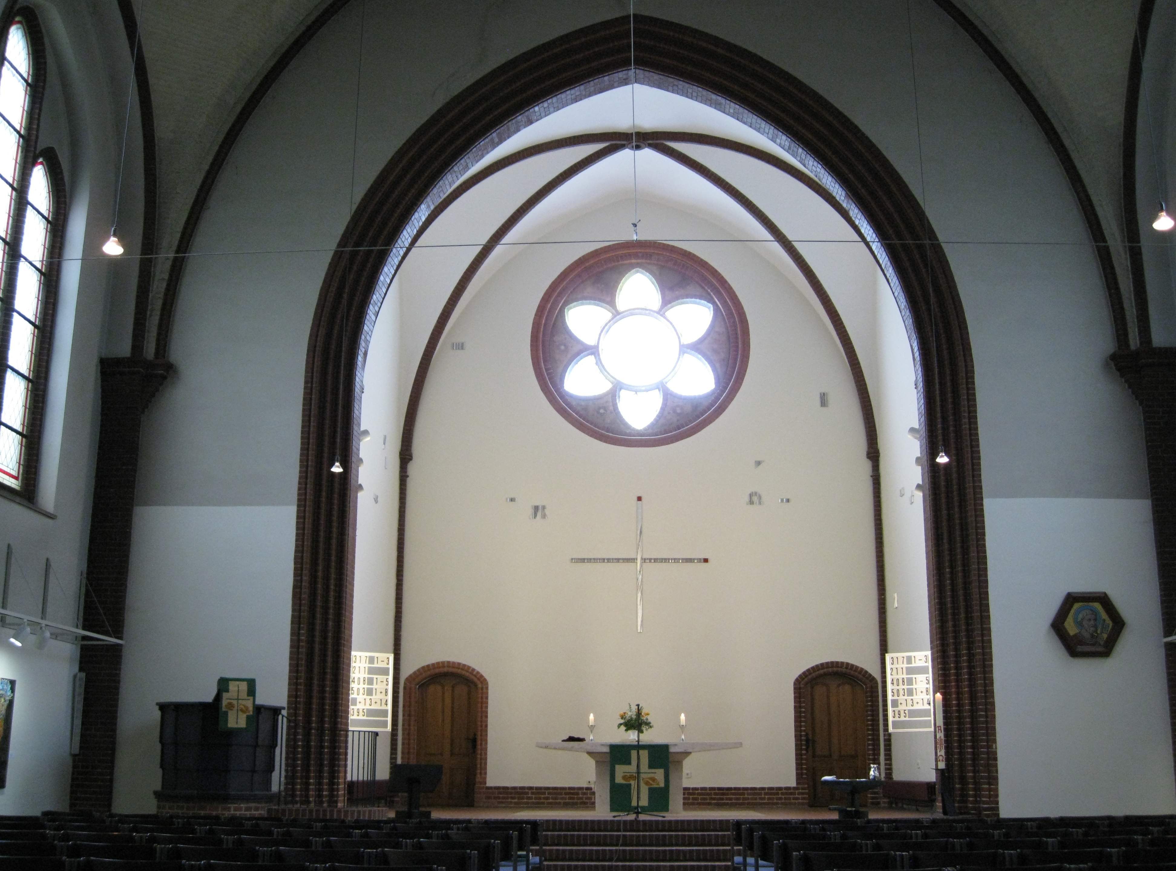 Altar der Petruskirche am Oberhofer Platz in Berlin-Lichterfelde